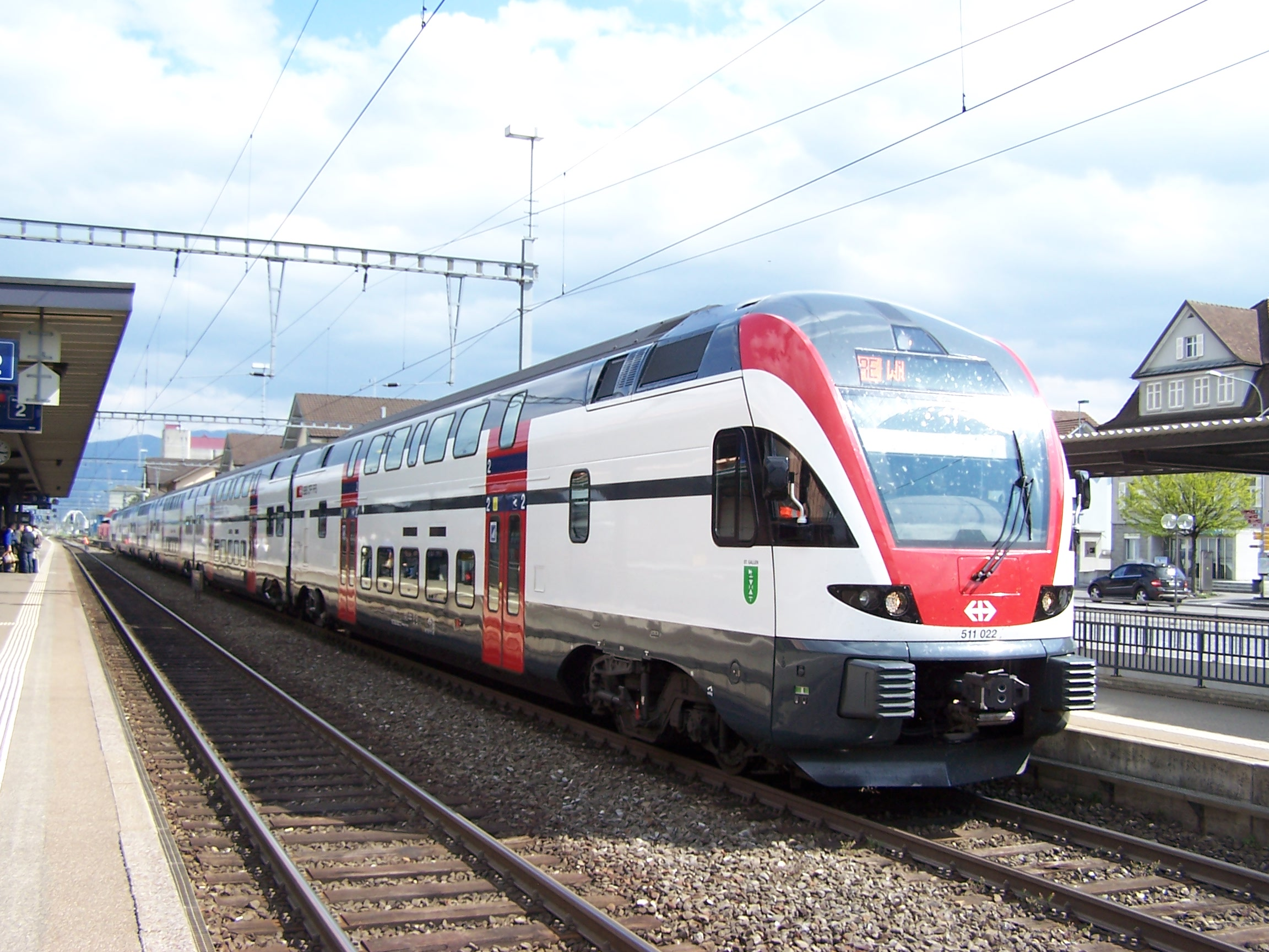 SBB Stadler KISS 511 022 in St. Margrethen auf dem Weg nach Wil